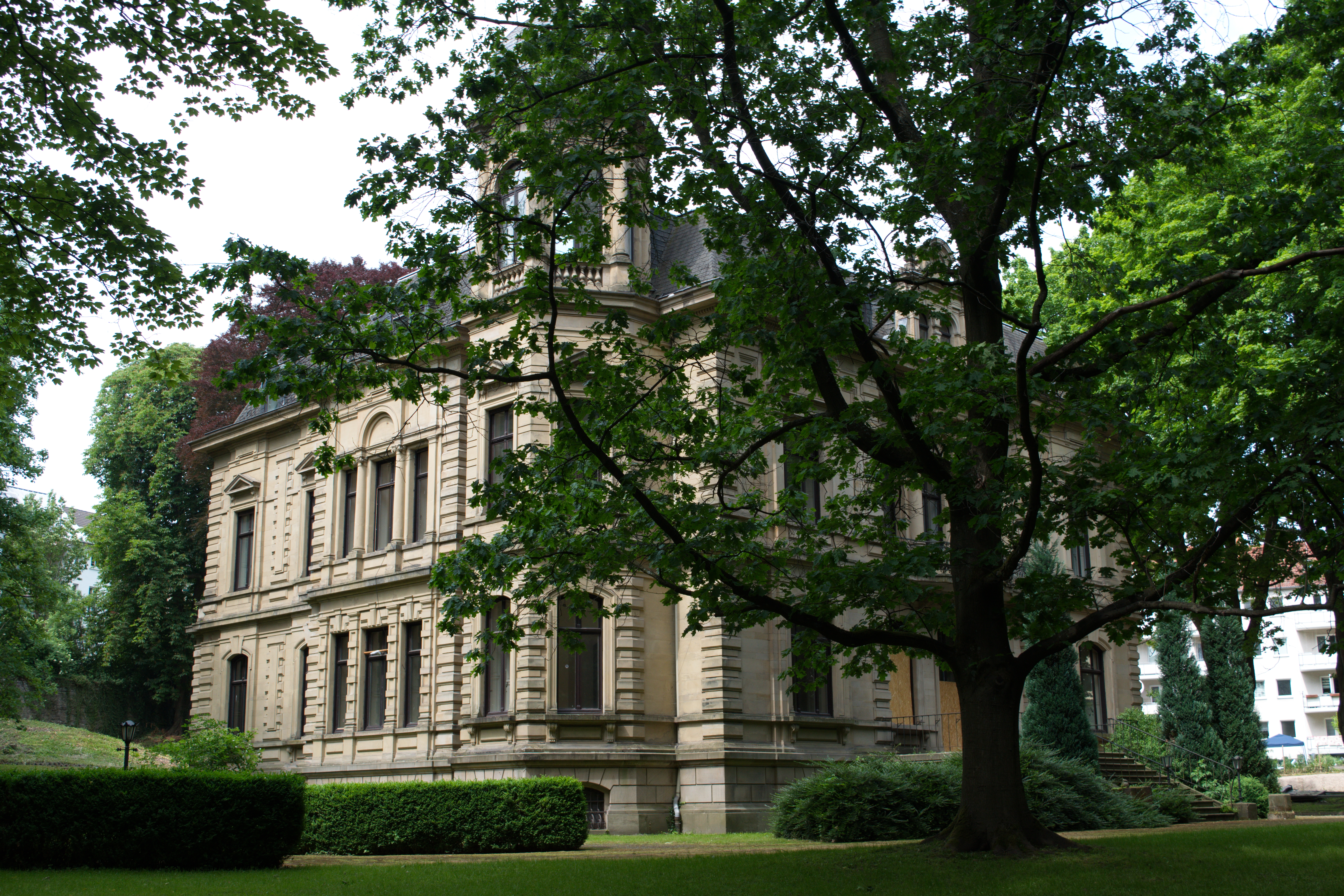 Briller Straße, Wuppertal